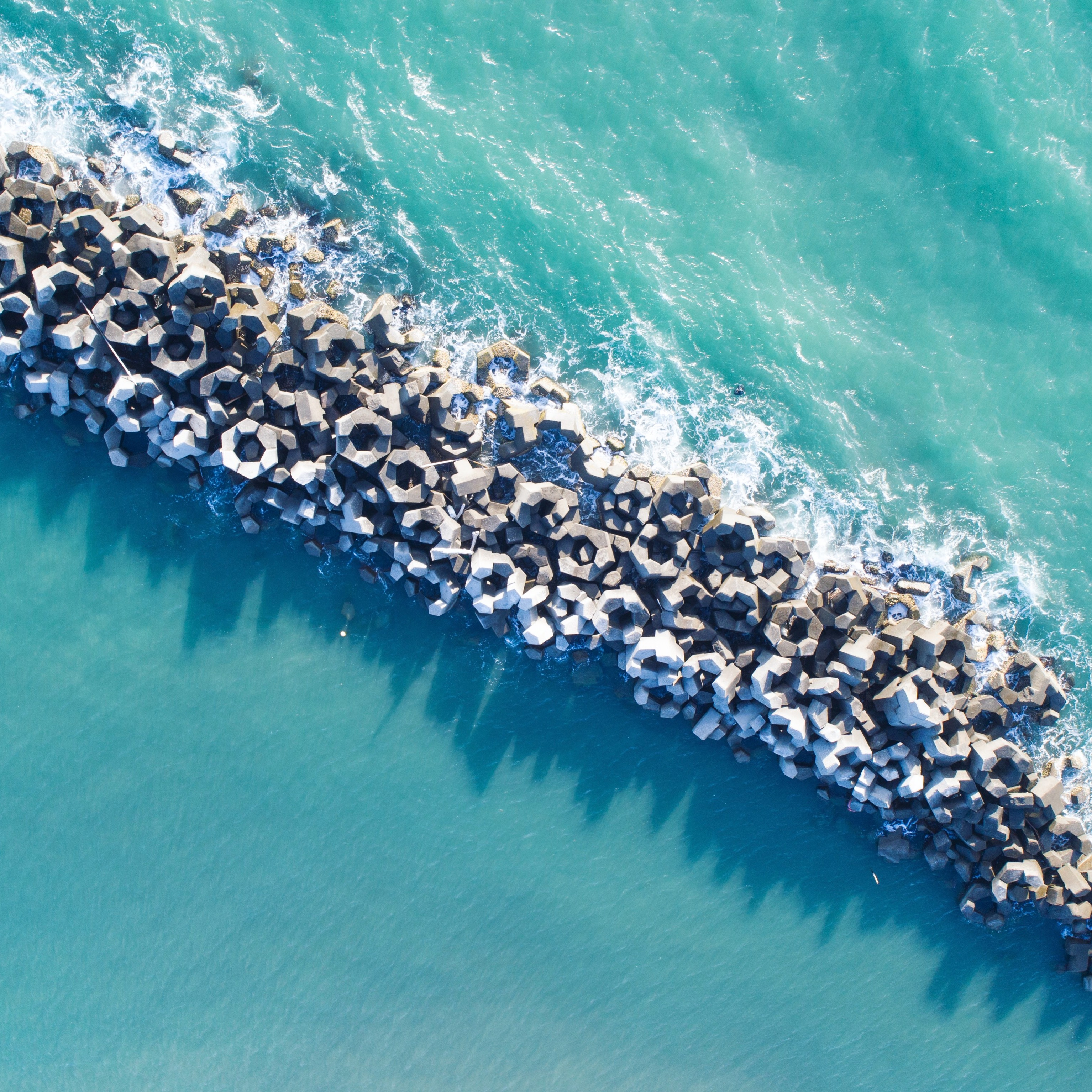 中文（台灣）: 海上消坡塊 ( 位於台南七股區國聖燈塔 )